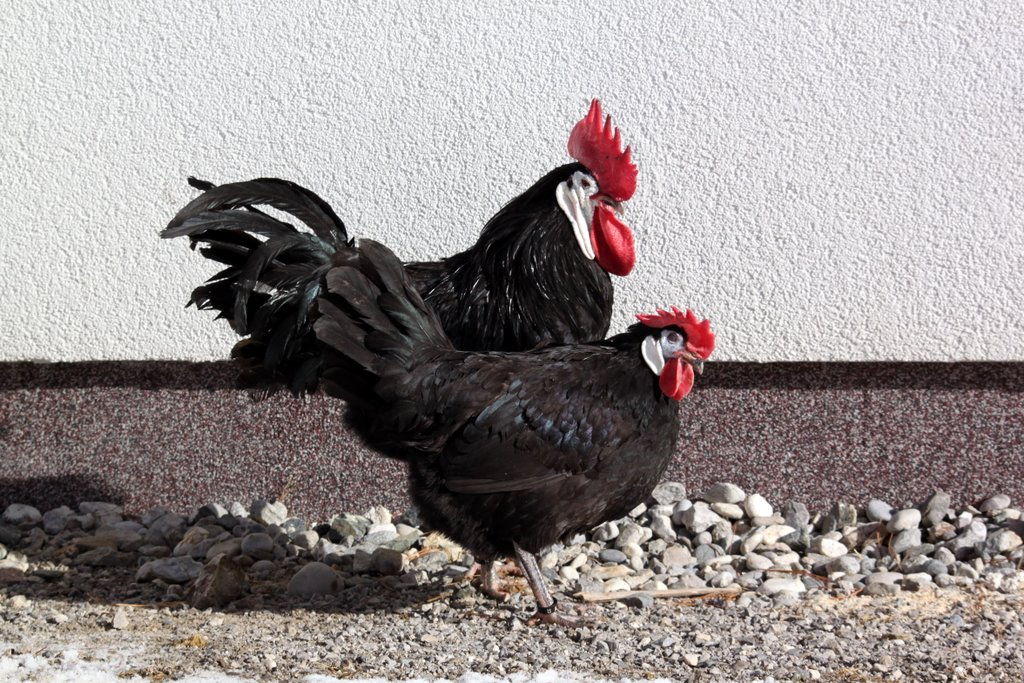 Spanier Hahn und Henne